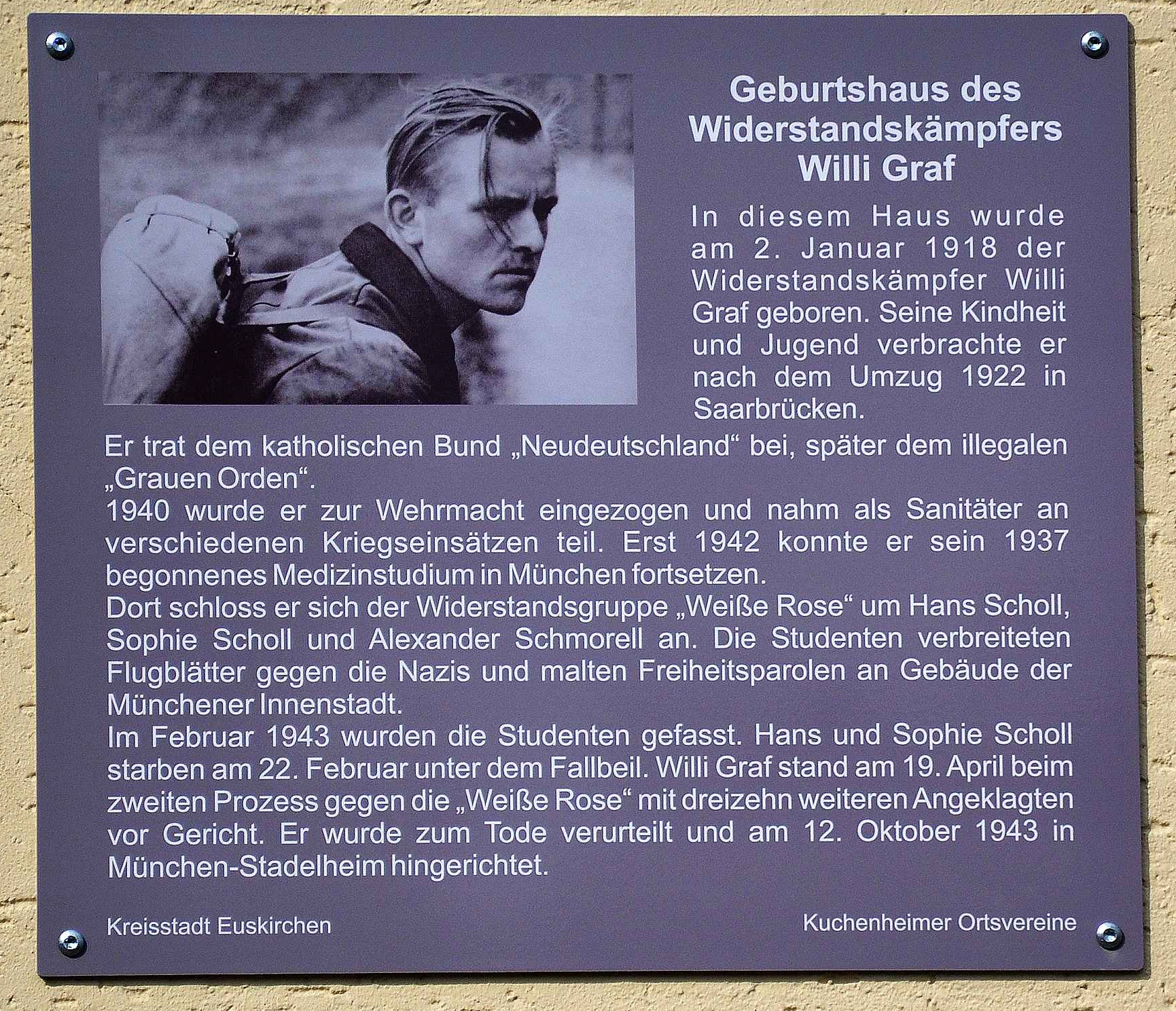 Tafel am Geburtshaus von Willi Graf, Euskirchen-Kuchenheim, Willi-Graf-Str. 88